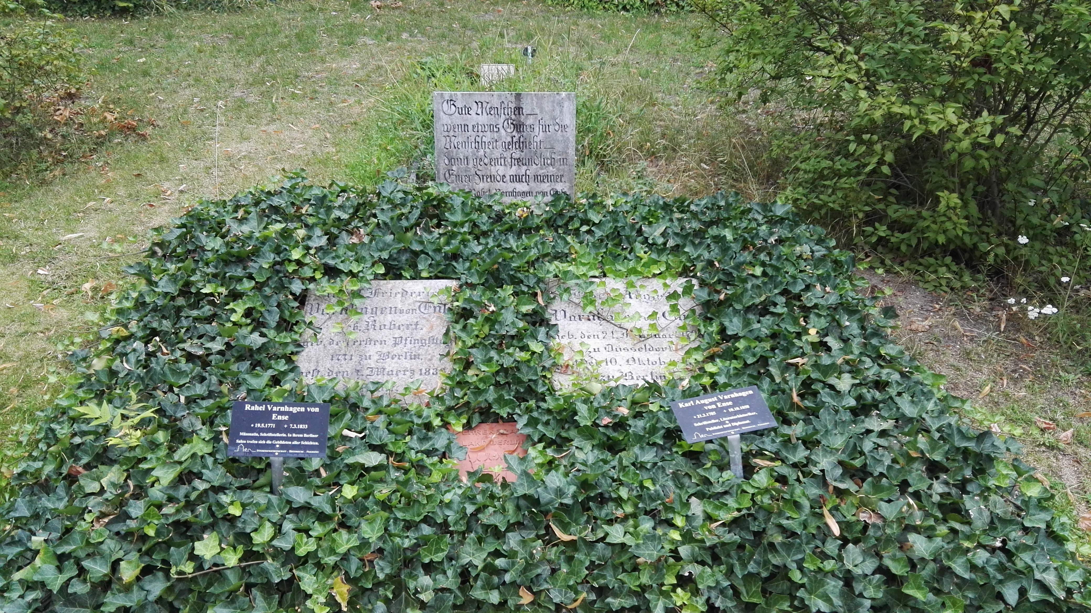 Grab von Karl August Varnhagen von Ense (1785–1858), Diplomat, Schriftsteller und Rahel Varnhagen von Ense (1771–1833), Schriftstellerin, Ehrengrab auf dem Friedhof I der Dreifaltigkeitsgemeinde in Berlin